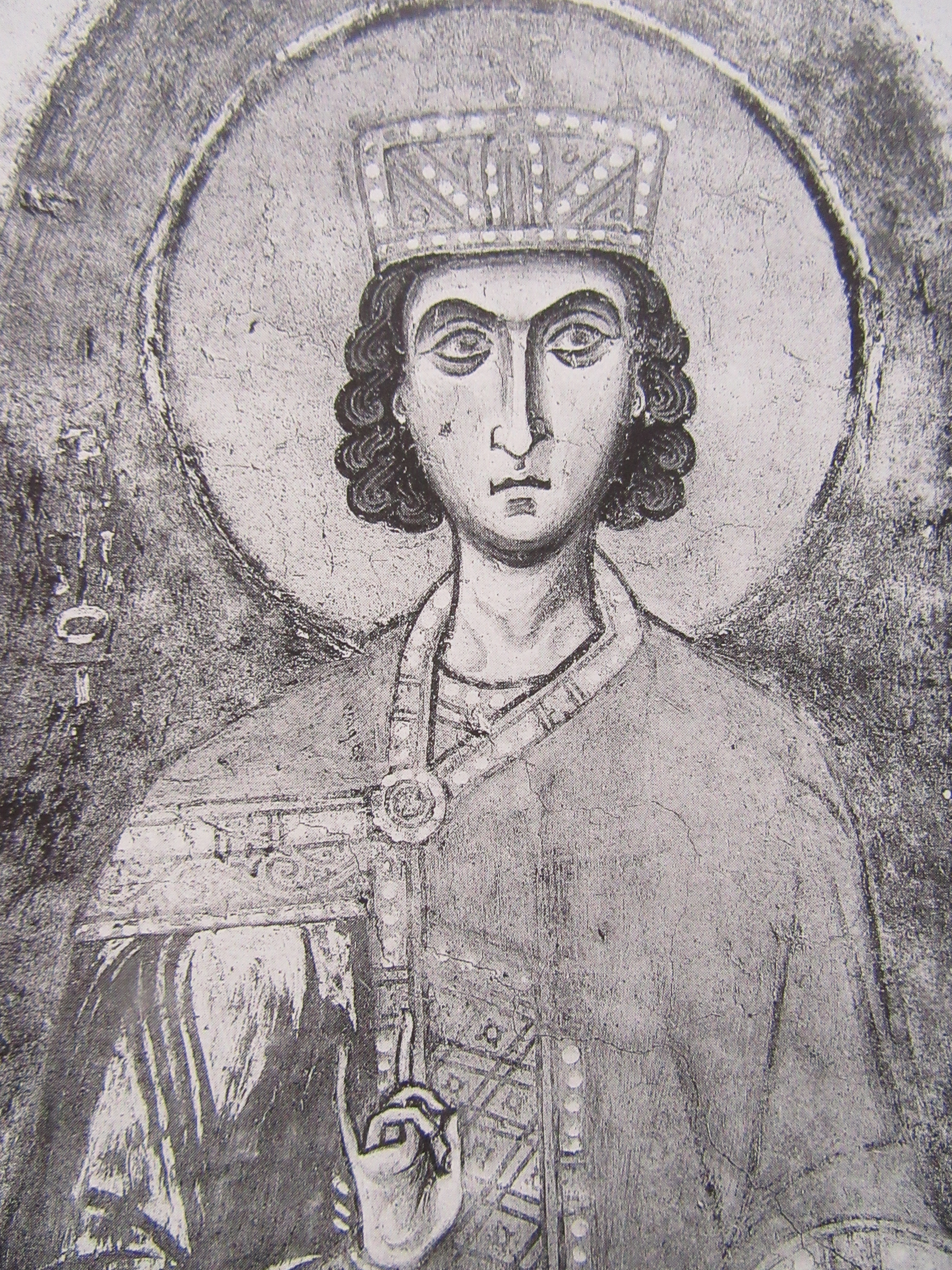 Le prophète Salomon fresque de 1167 environ à Staraïa Lagoda